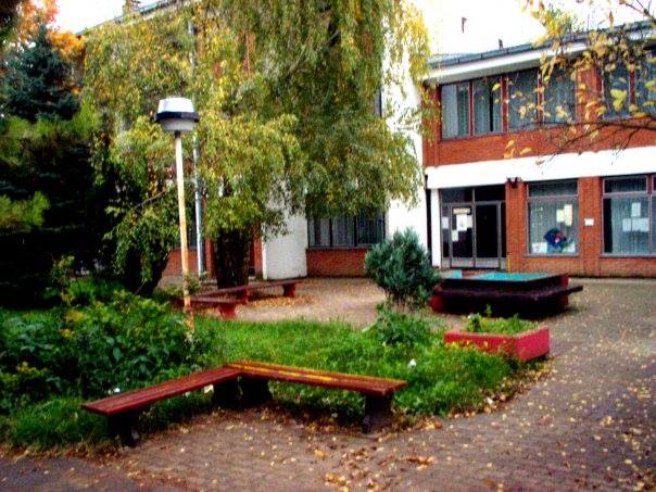 Нови Козјак